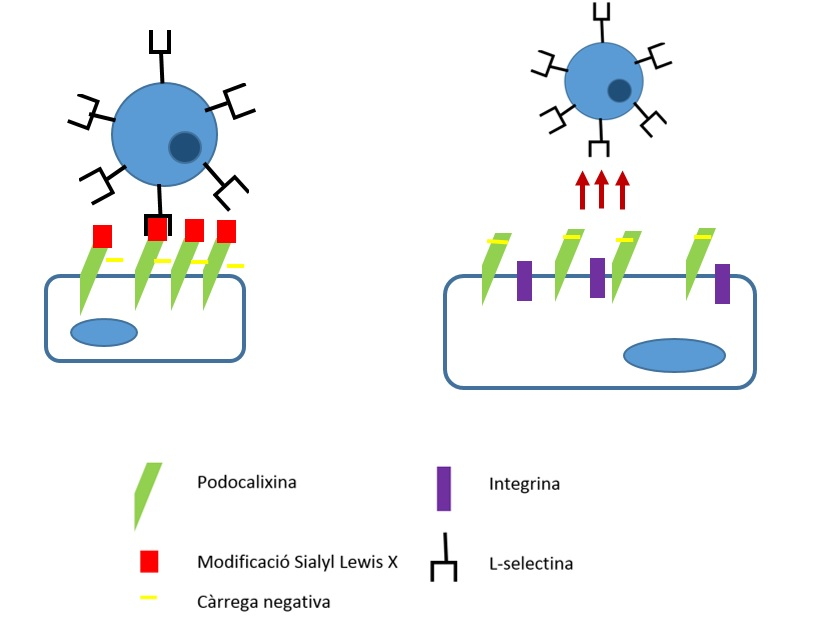 Esquema simplificado del proceso de adhesión y anti adhesión celular